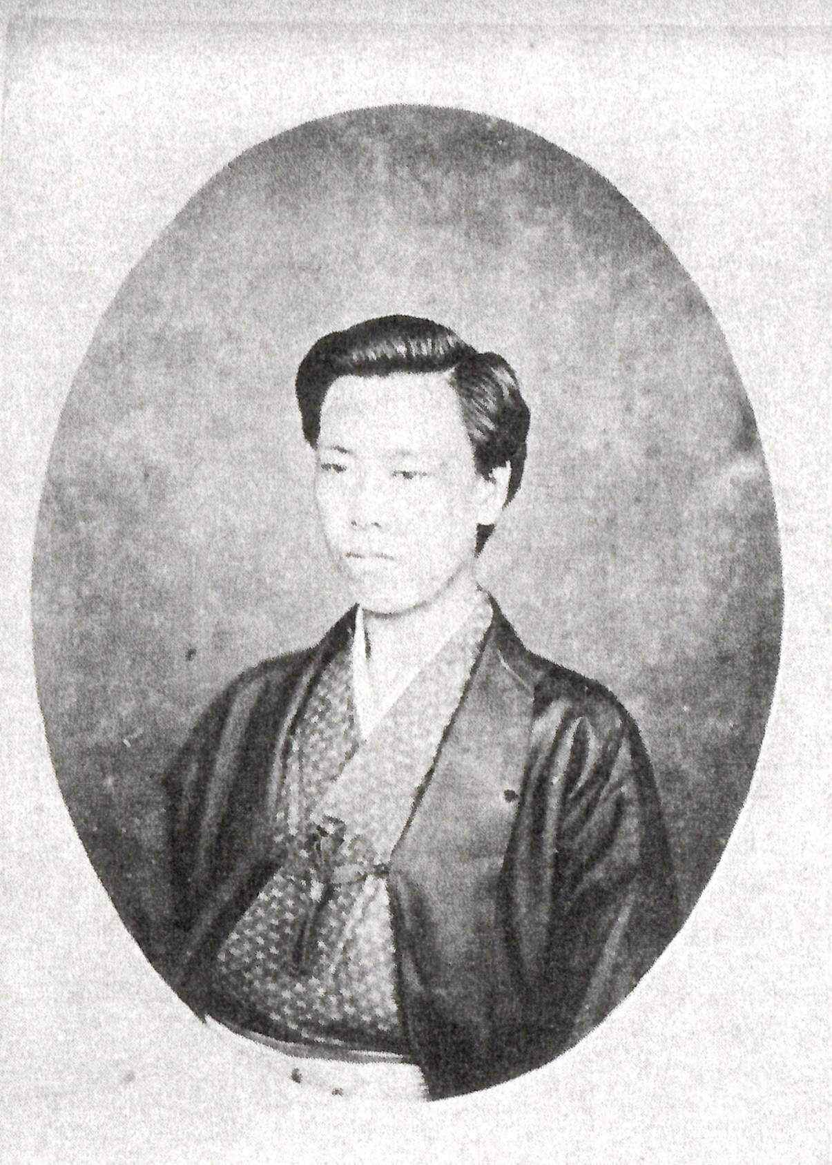 一柳頼明の肖像写真。